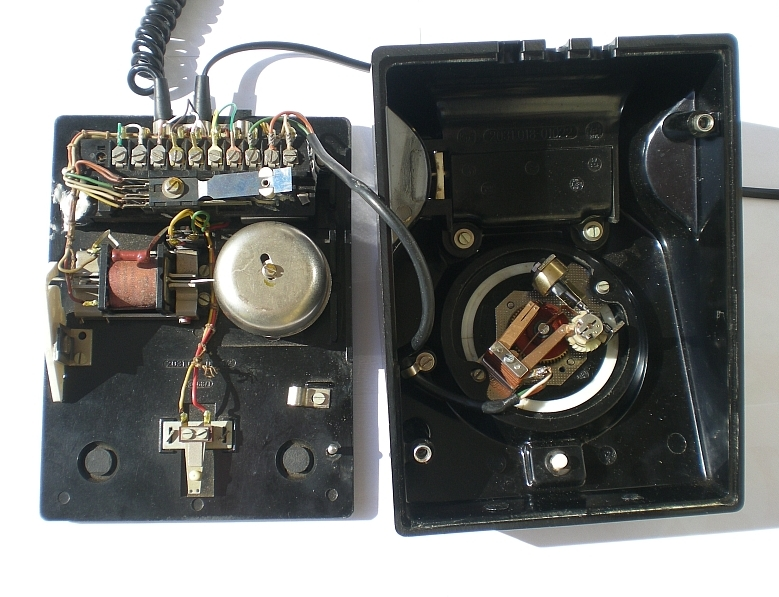 W58 geöffnet